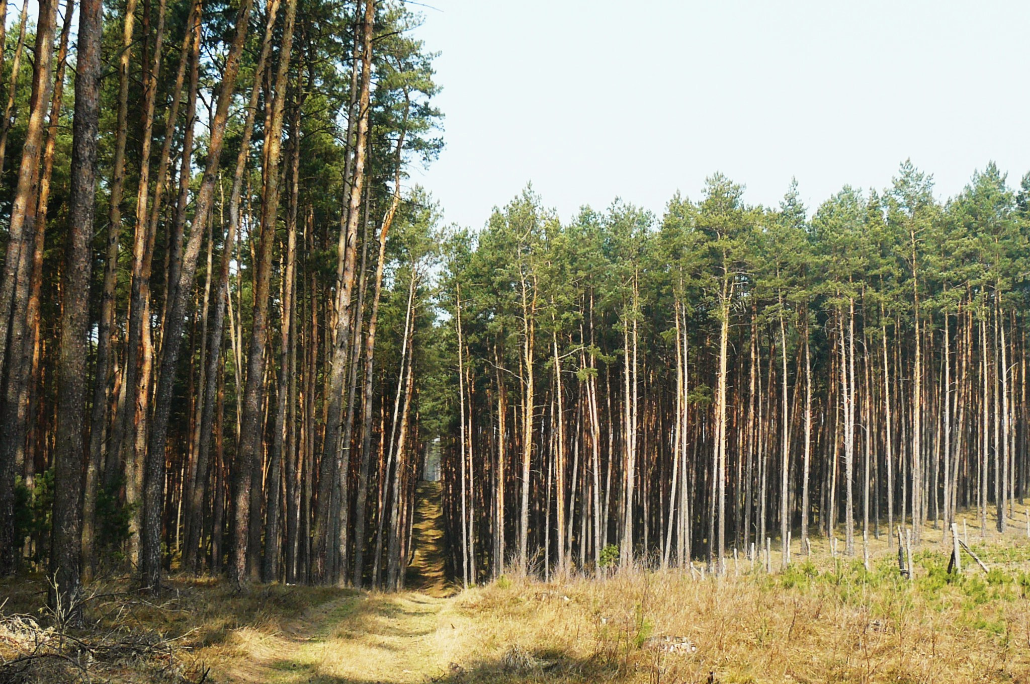 Puszcza Drawska koło Starych Bielic.